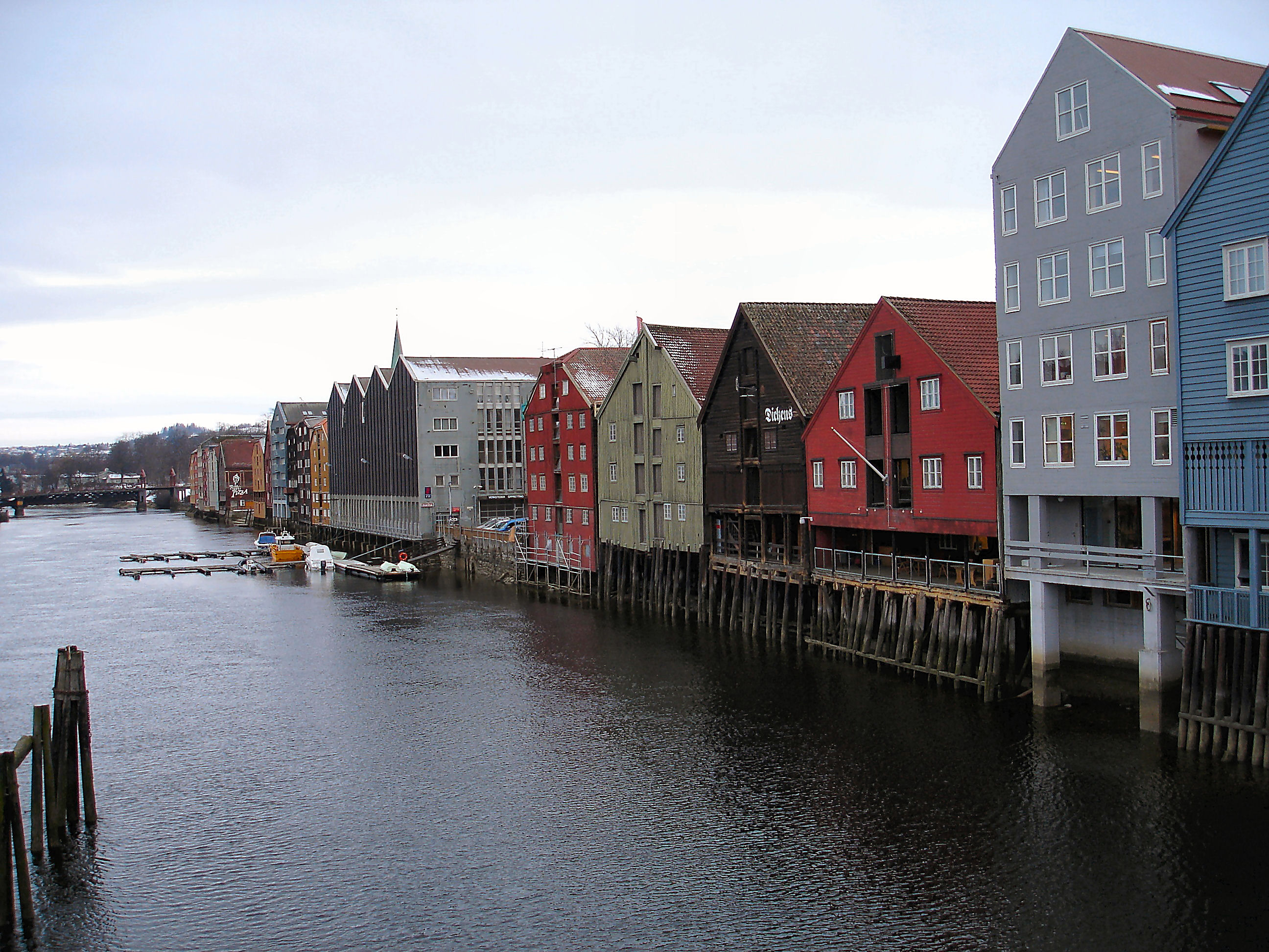 Pakhuizen langsheen de Nidelva